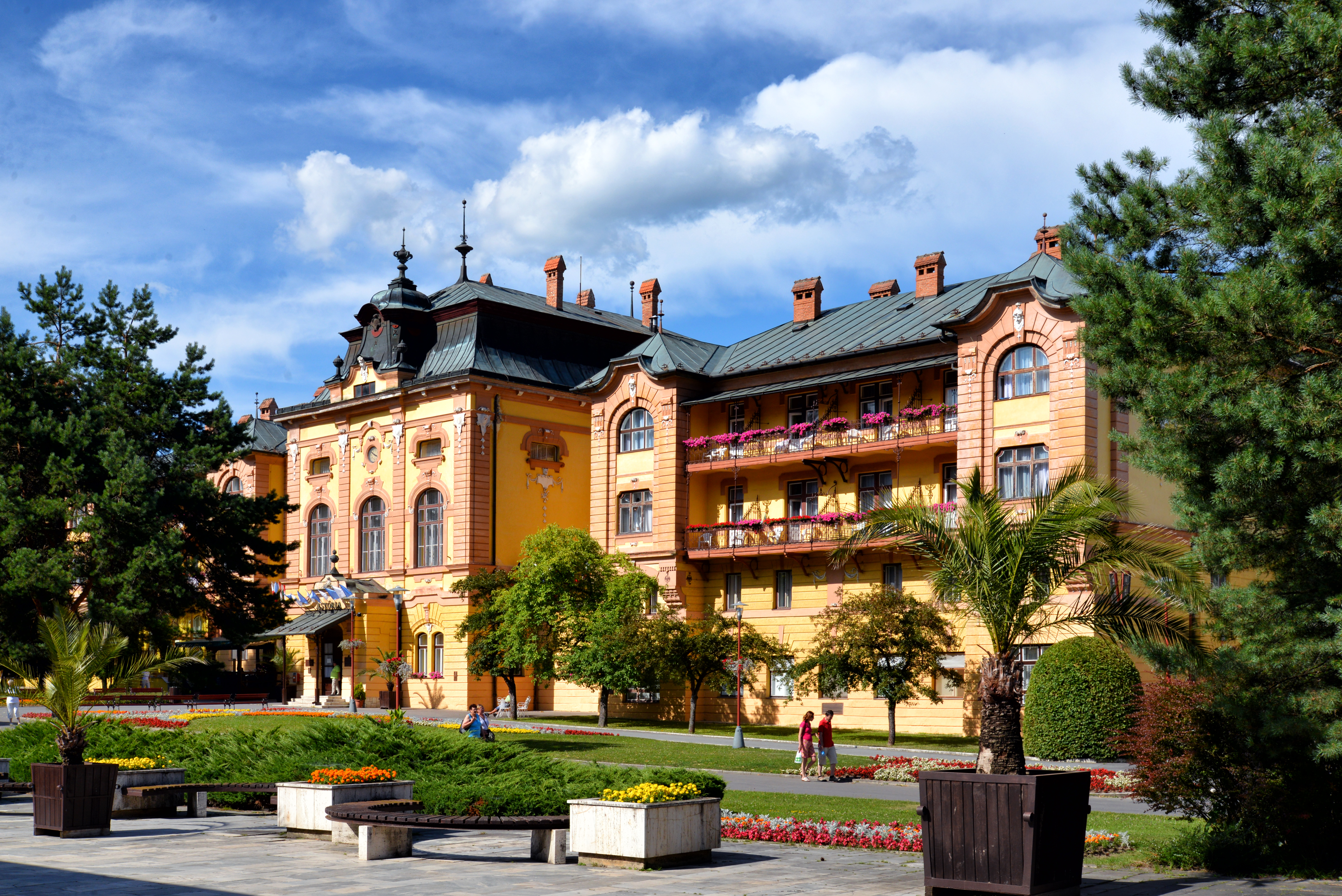 Bardejov, Prešov (Slovaquie) - L'hôtel Astoria à la station thermale de Bardejovské_Kúpele